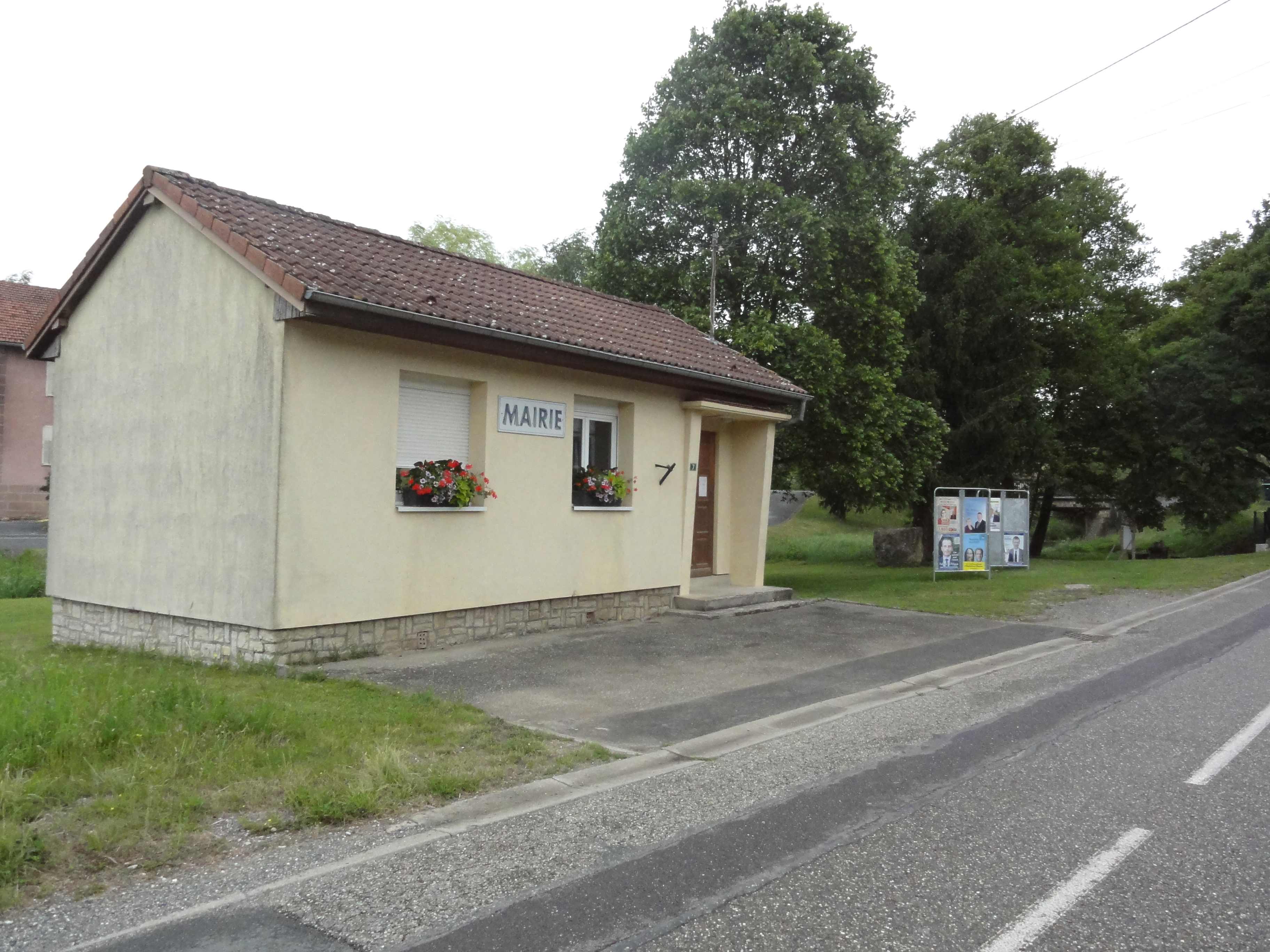 Neufmoulins (Moselle) mairie